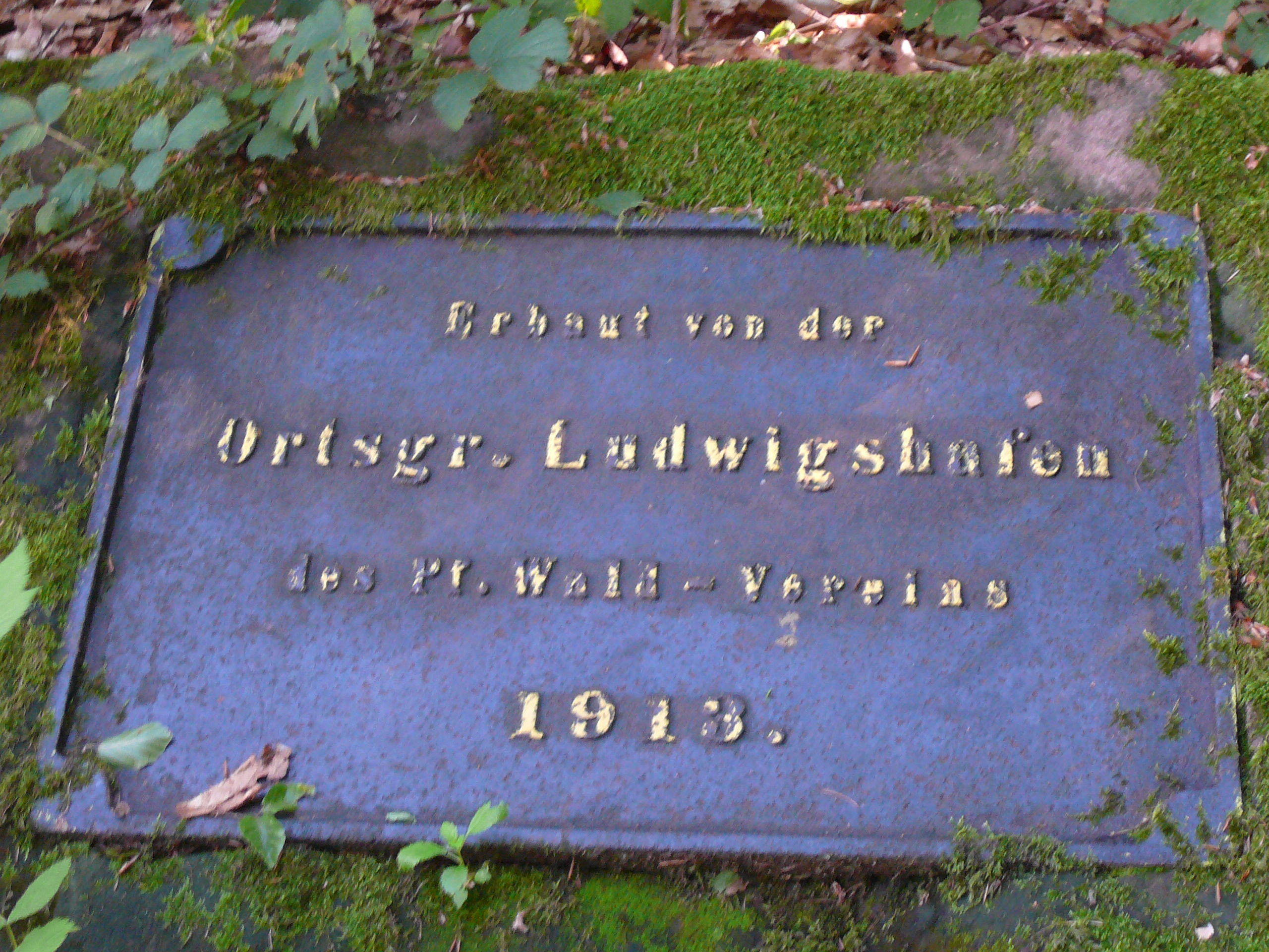 Gedenktafel zur Errichtung der Rehbergquelle im Jahre 1913